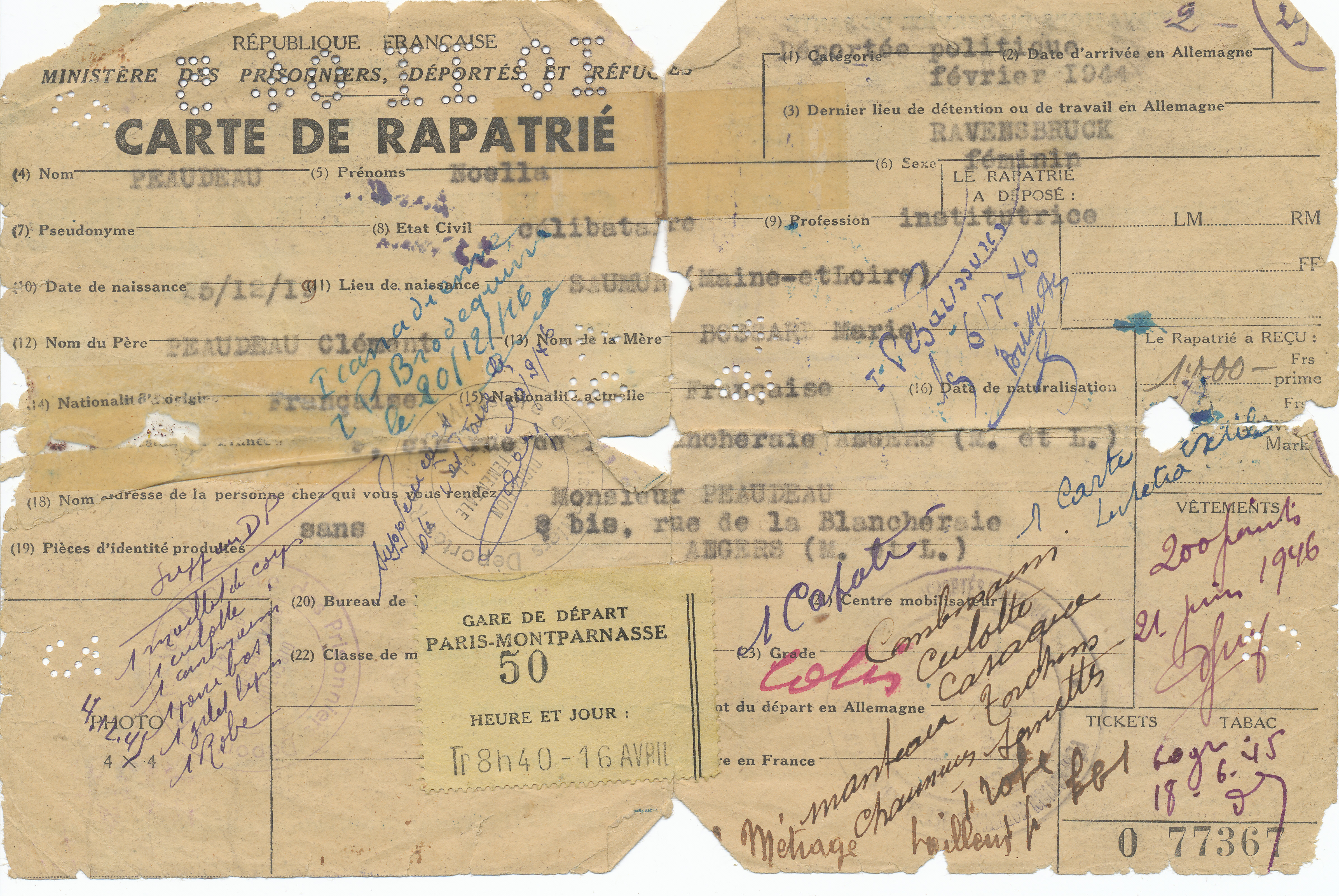 Intérieur de la carte de rapatriée de Noëlla Rouget avec les mentions du passage au Lutétia, et les paquets de linge reçus, ainsi que le départ de la gare de Montparnasse à Paris pour Angers...